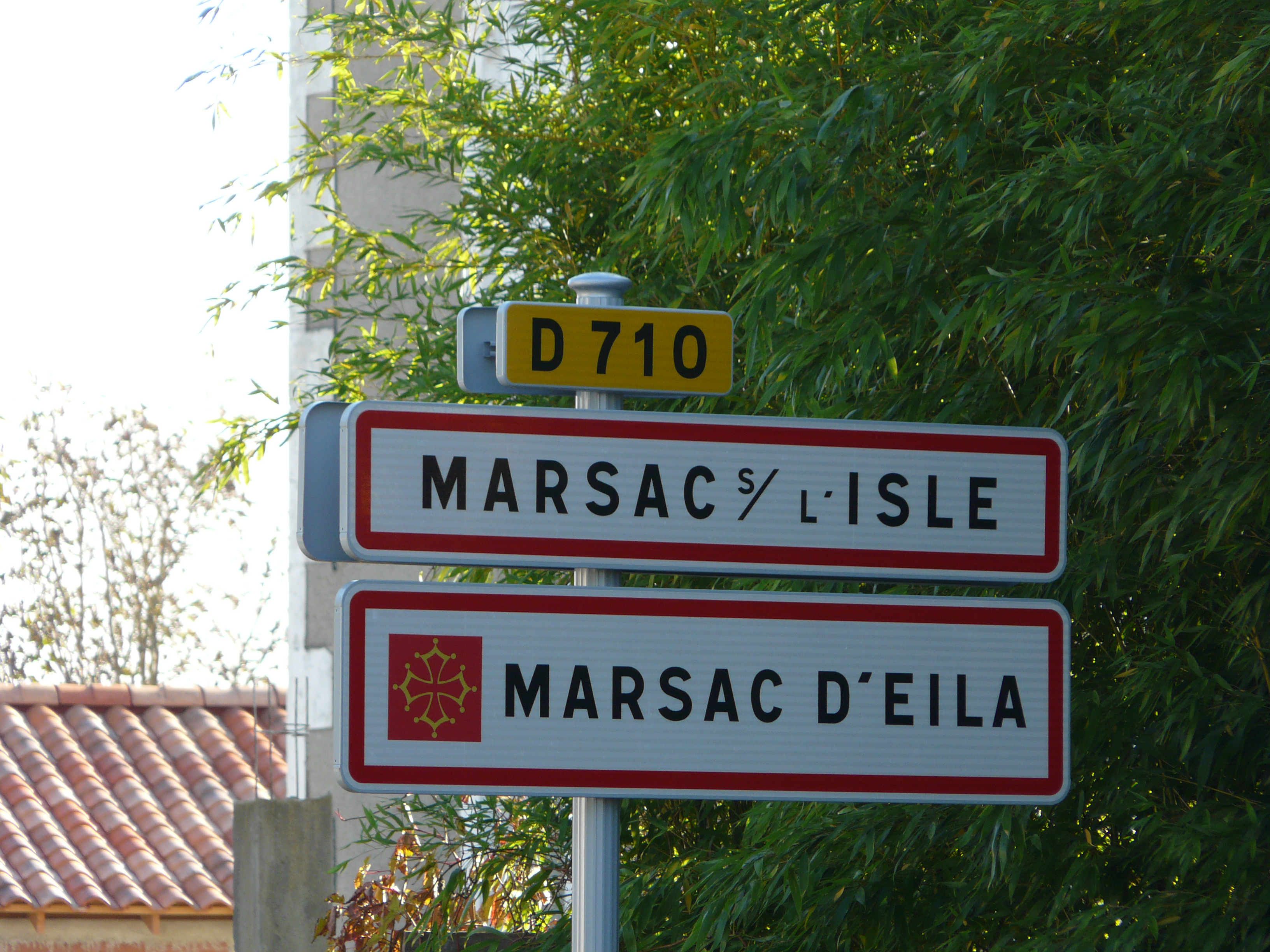 Panneau d'entrée en français et occitan à Marsac-sur-l'Isle, Dordogne, France.